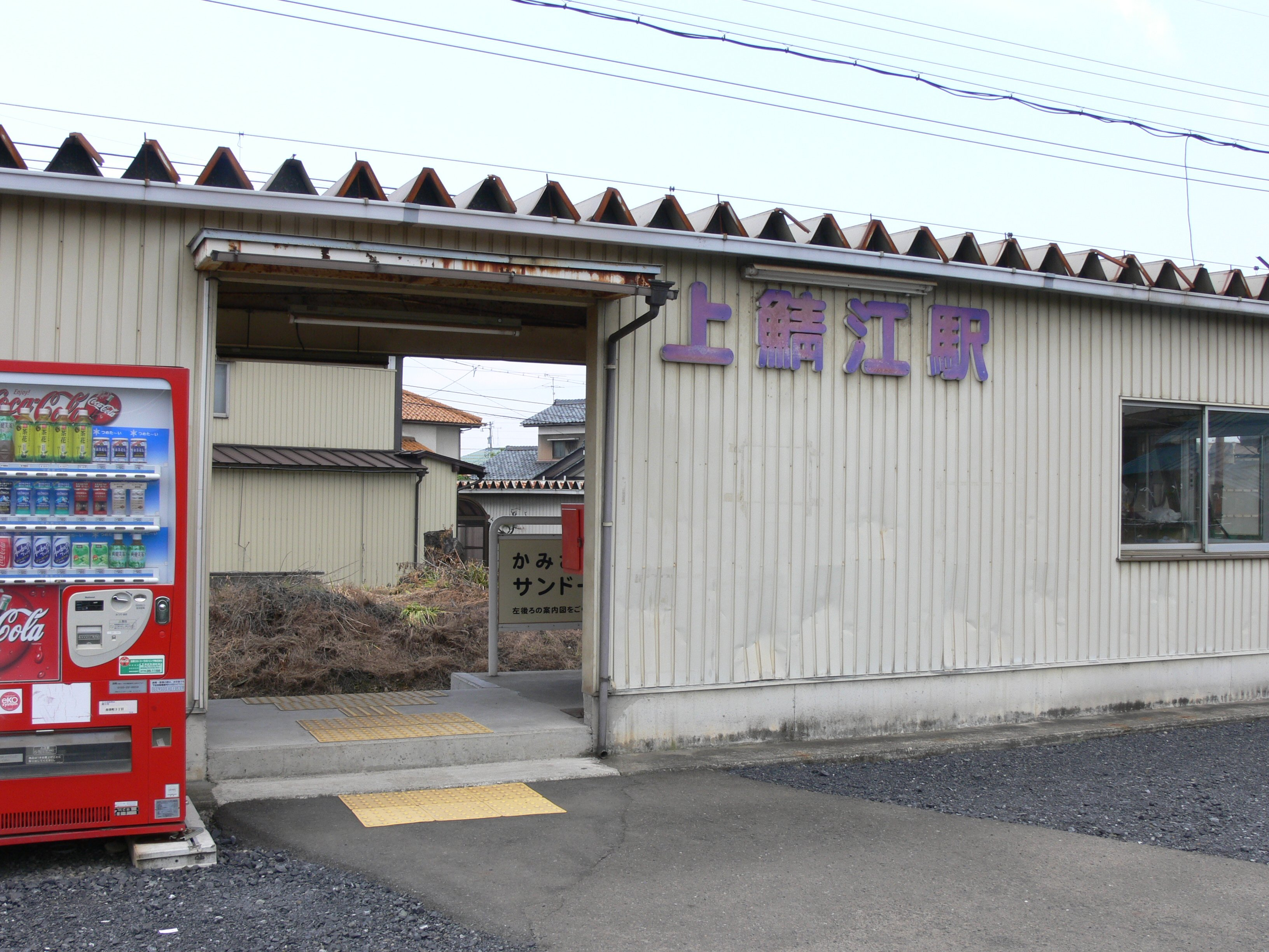 Kami-Sabae Station